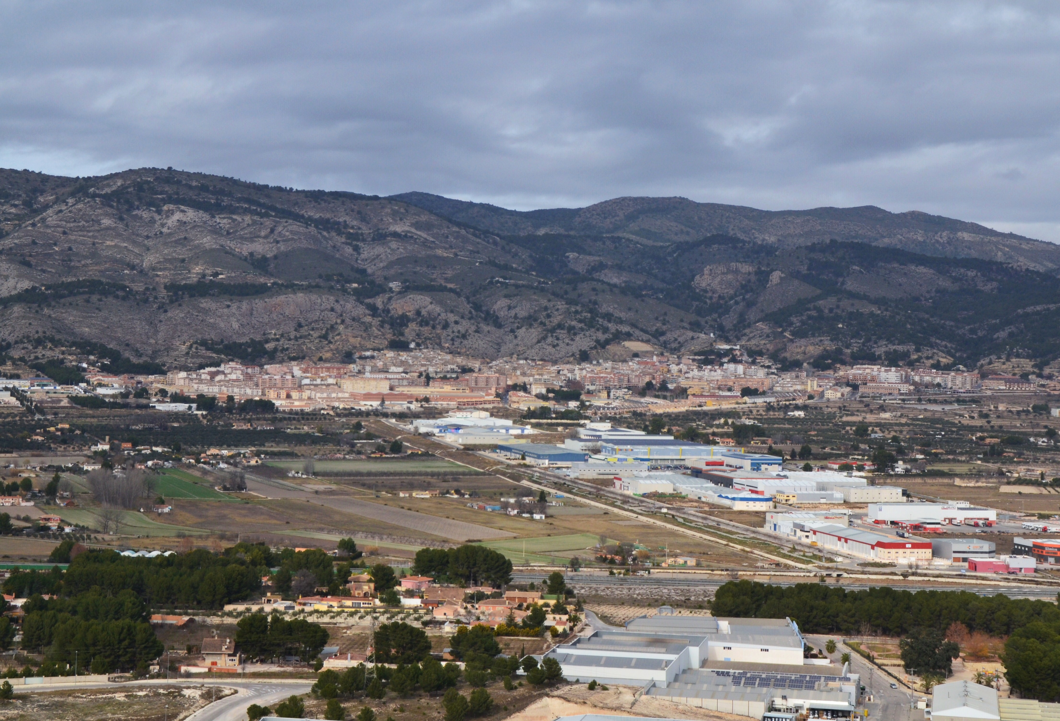 Onil des del castell de Castalla.